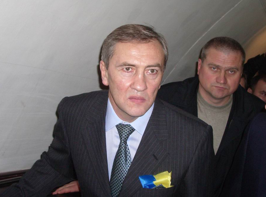 Киевский городской голова Леонид Черновецкий на эскалаторе станции метро «Крещатик».